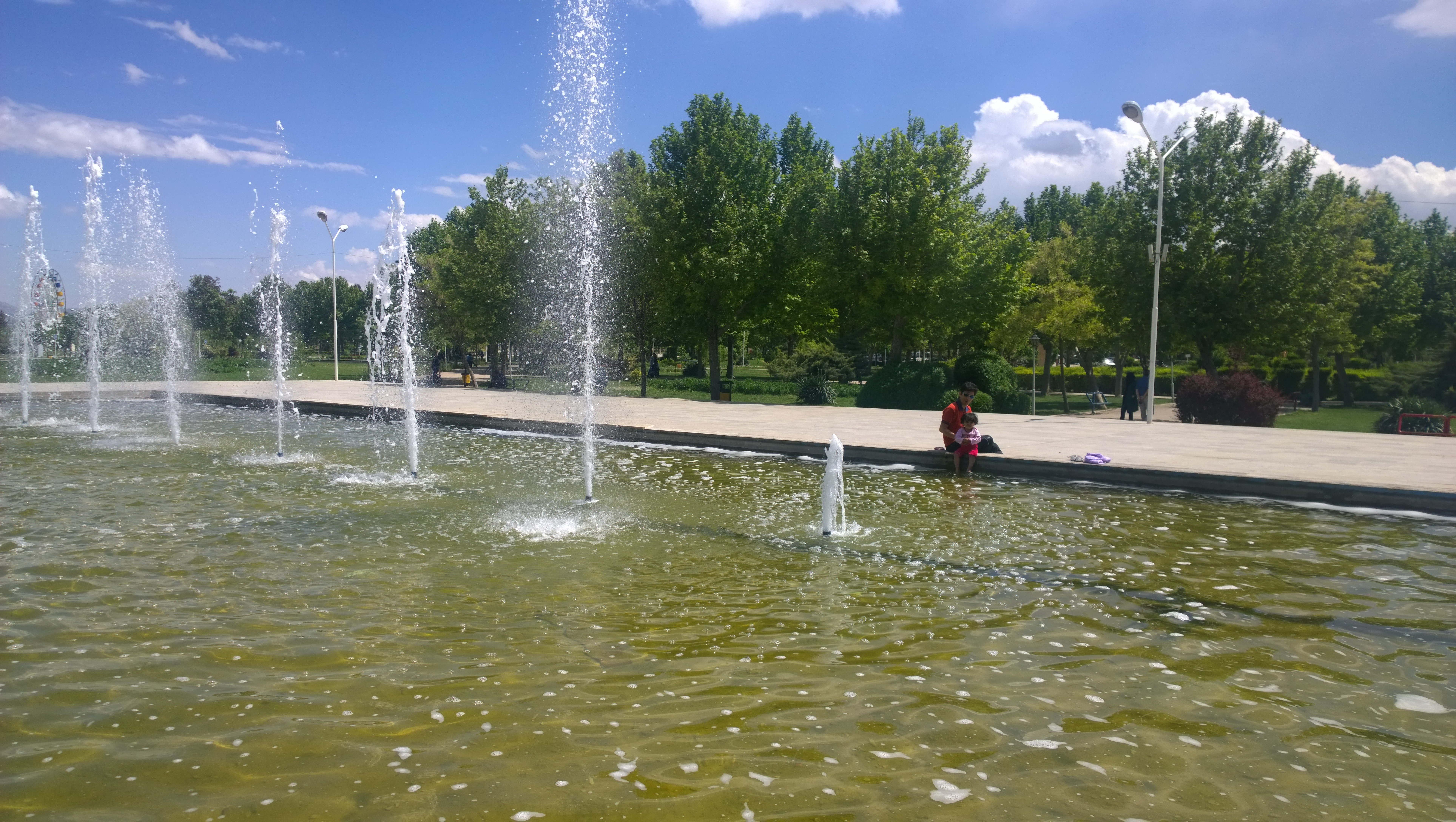 پارک شما